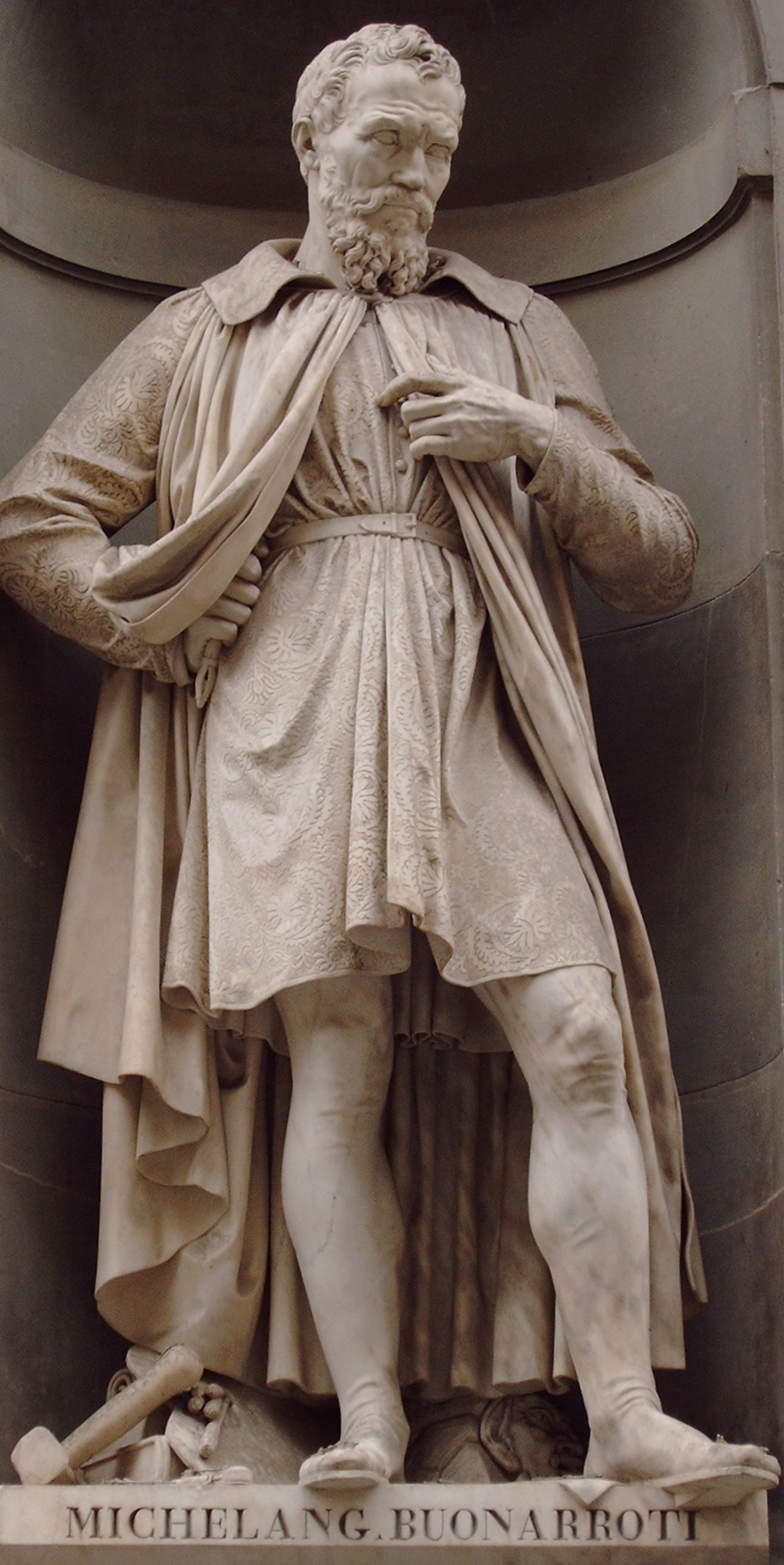 Firenze, Loggiato degli Uffizi, Statue degli „Illustri Toscani“, Statua di Michelangelo Buonarroti di Emilio Santarelli.